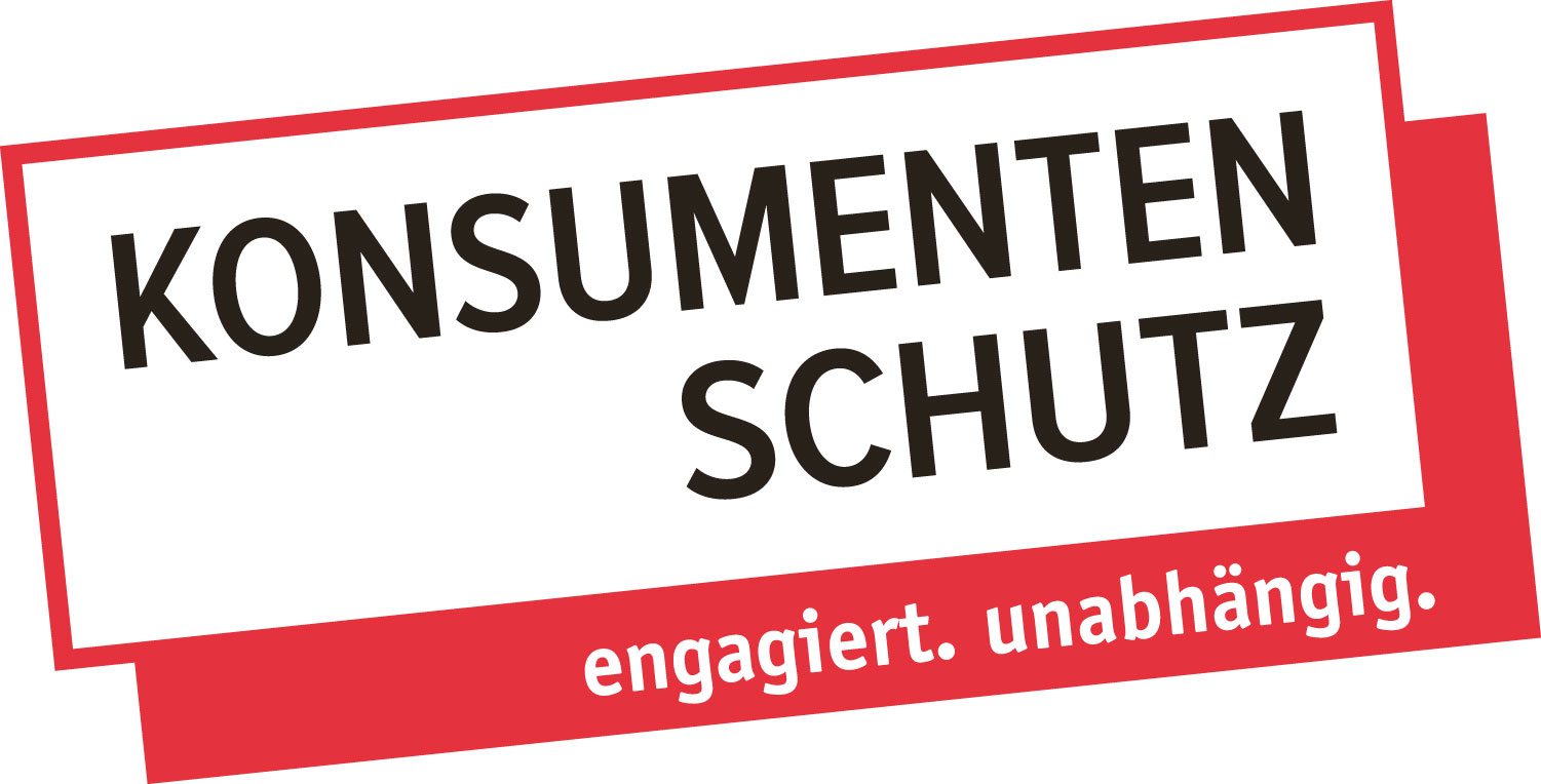 Logo